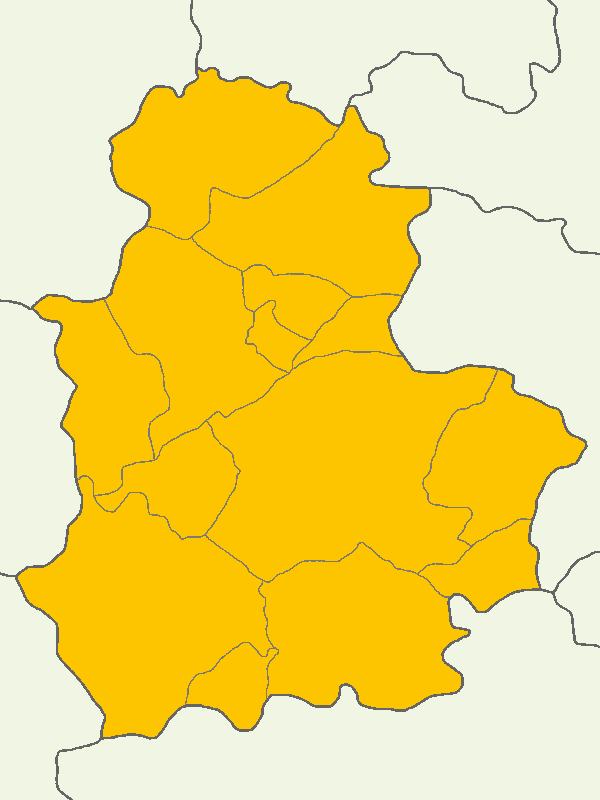 Çorum'da 2014 Türkiye cumhurbaşkanlığı seçimi sonuçları